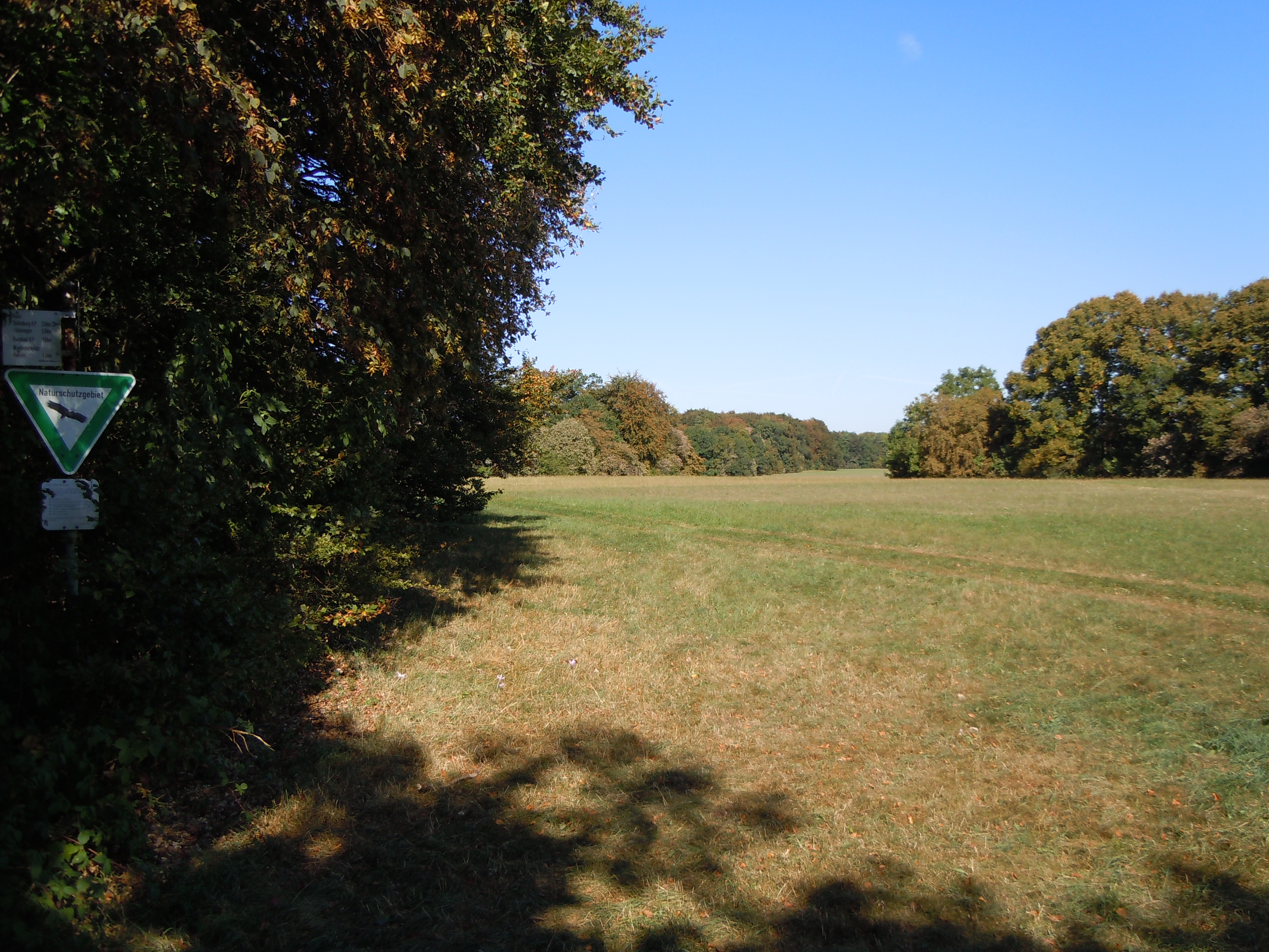 NSG Hochwiesen-Pfullinger Berg: Magerwiese mit Waldmantel und Baumgruppe